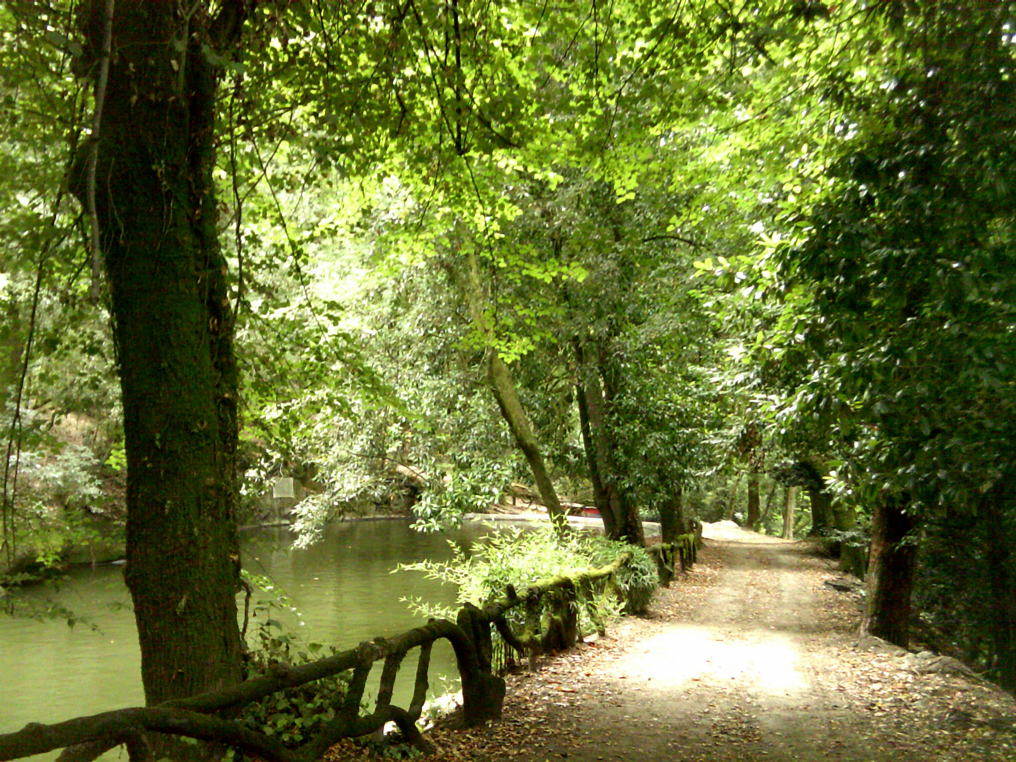 Santuário do Bom Jesus do Monte, freguesia de Tenões, concelho e distrito de Braga, Portugal: aspecto de caminho no parque natural.